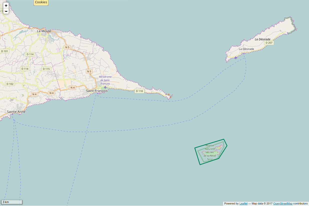 Périmètre de la RNN des Iles de la Petite-Terre.